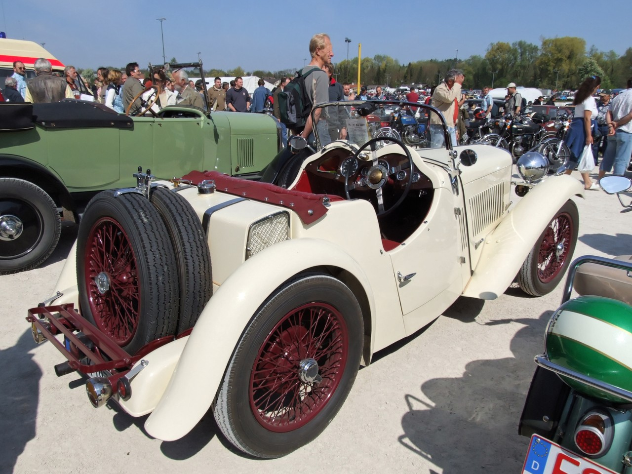 Quelle: selbst fotografiert, 04/2007 Fotograf: Späth Chr.